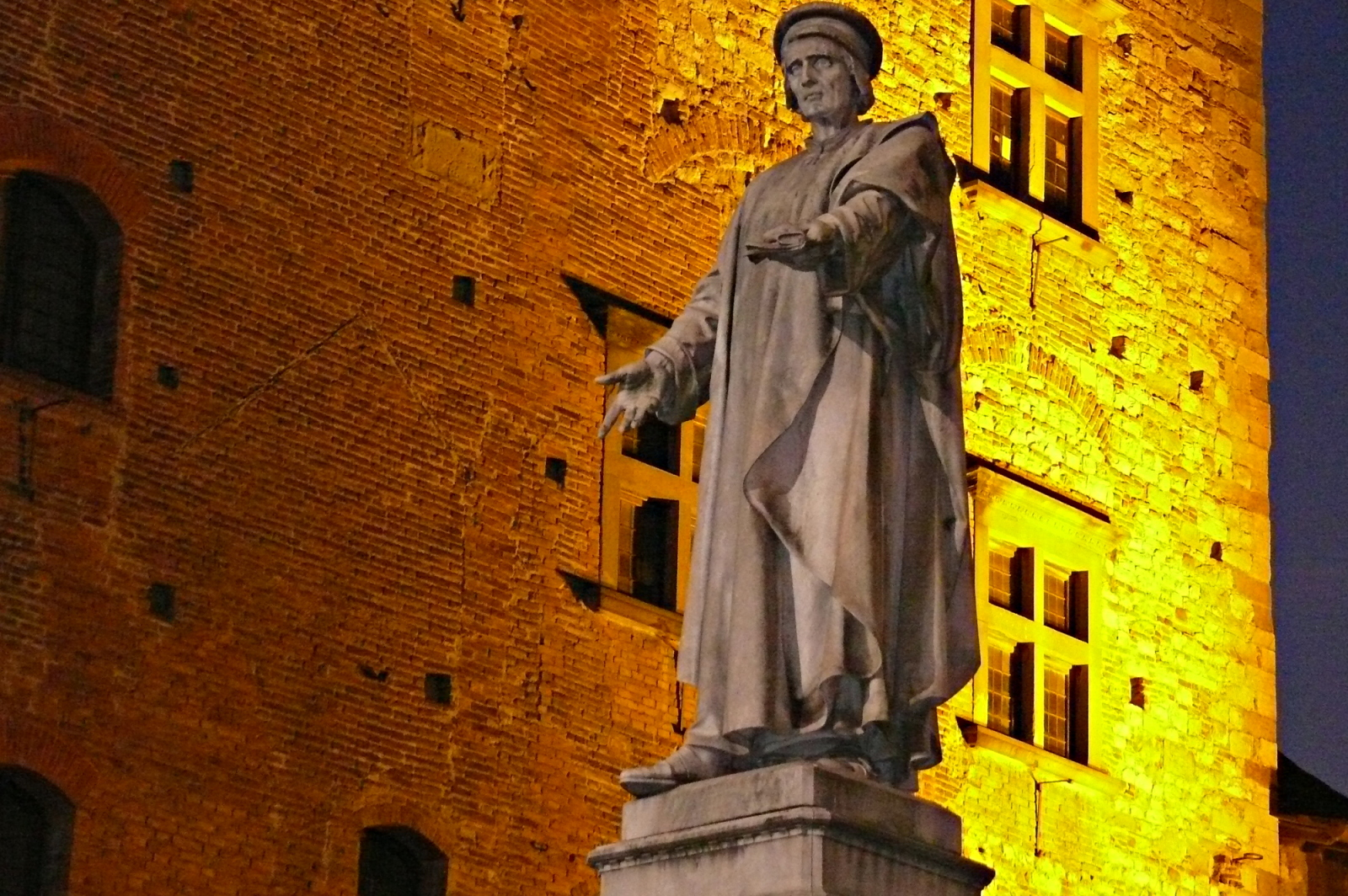 La statua di Datini davanti al Palazzo Pretorio